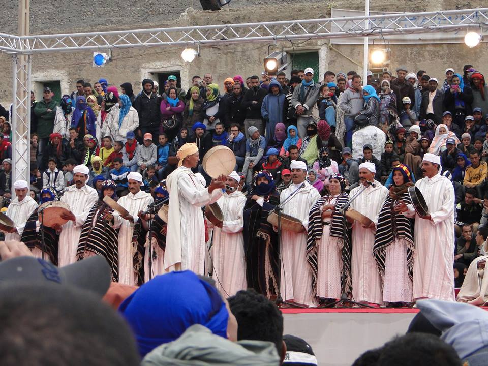 Ahidous, une danse traditionnelle pratiquée par les tribus berbères du Haut Atlas. cette photo est prise pendant le festival de moussem d'Imilchil, en 2014 This is an image from Morocco